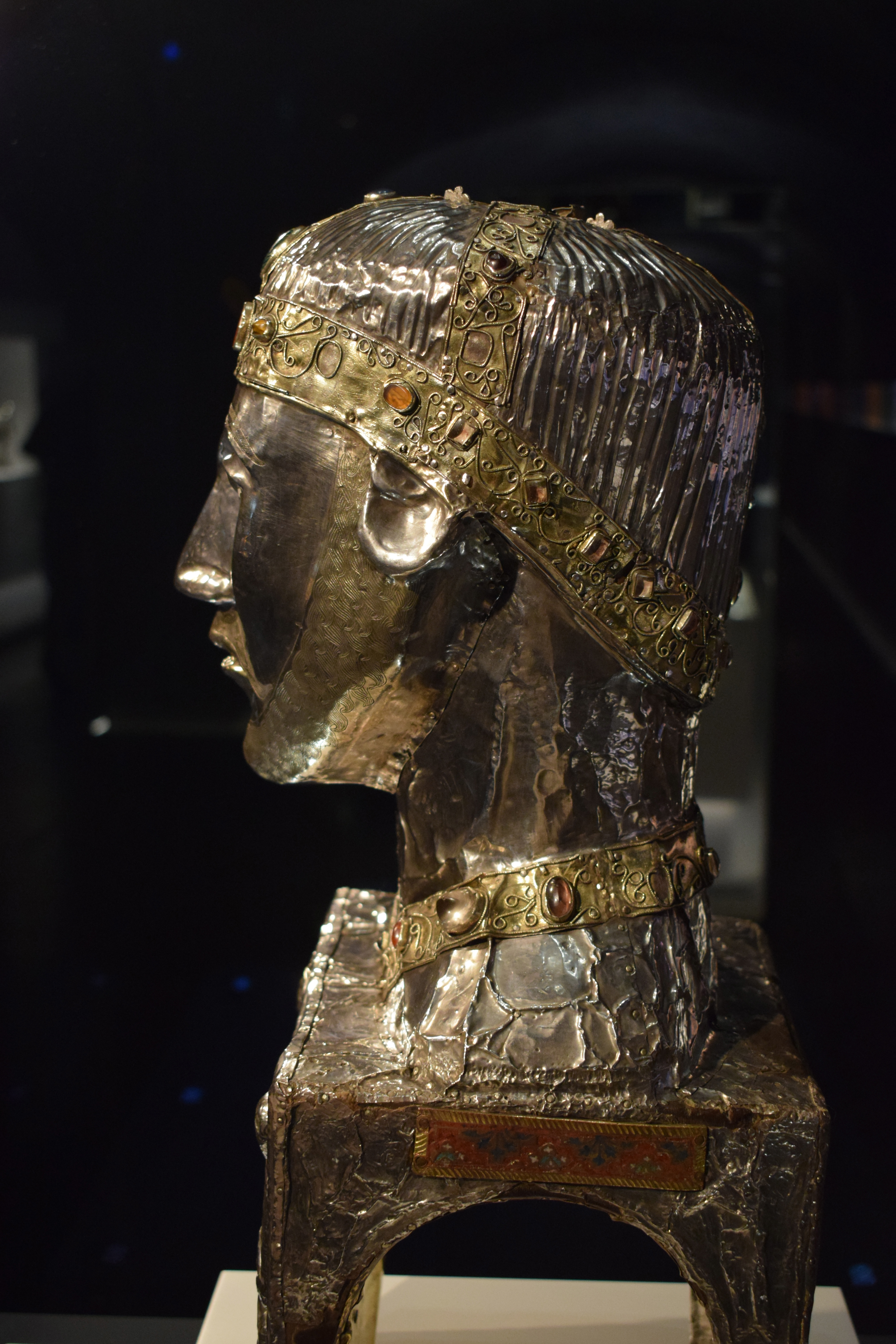 Vue du trésor de l'abbaye de Saint-Maurice, dans le canton du Valais en Suisse.